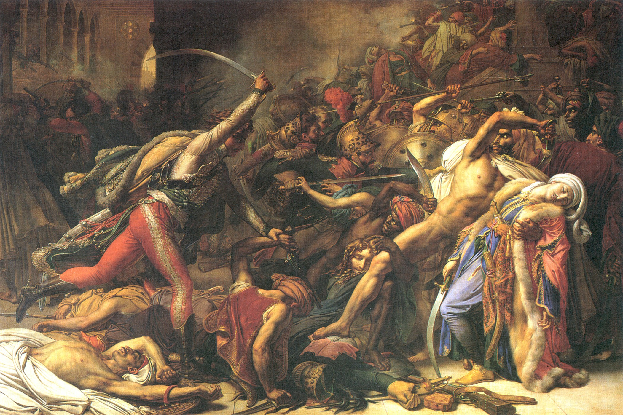 Révolte du Caire, 21 octobre 1798. Huile sur toile